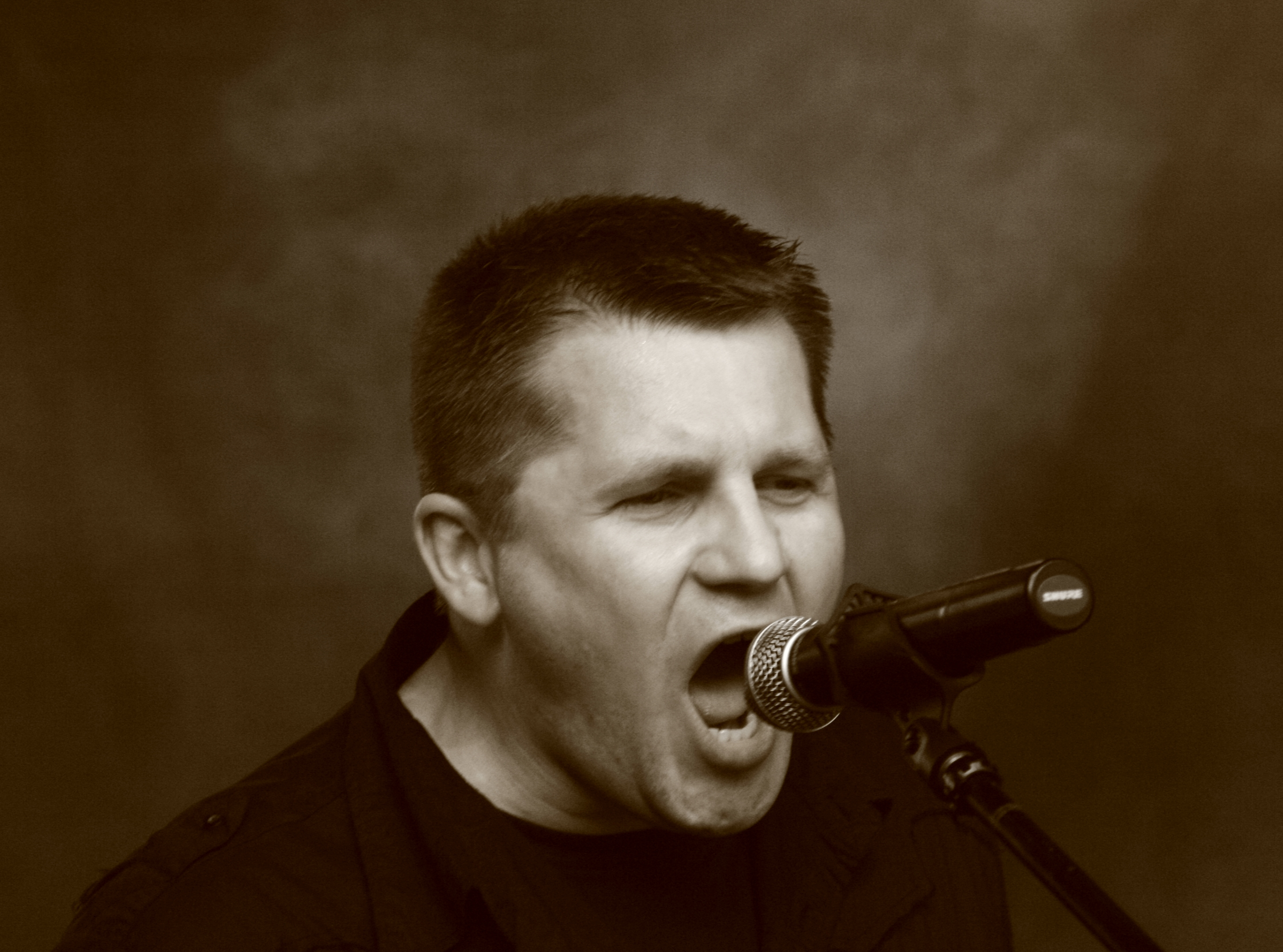 Robert Pląskowski from Desdemona, during Castle Party 2007